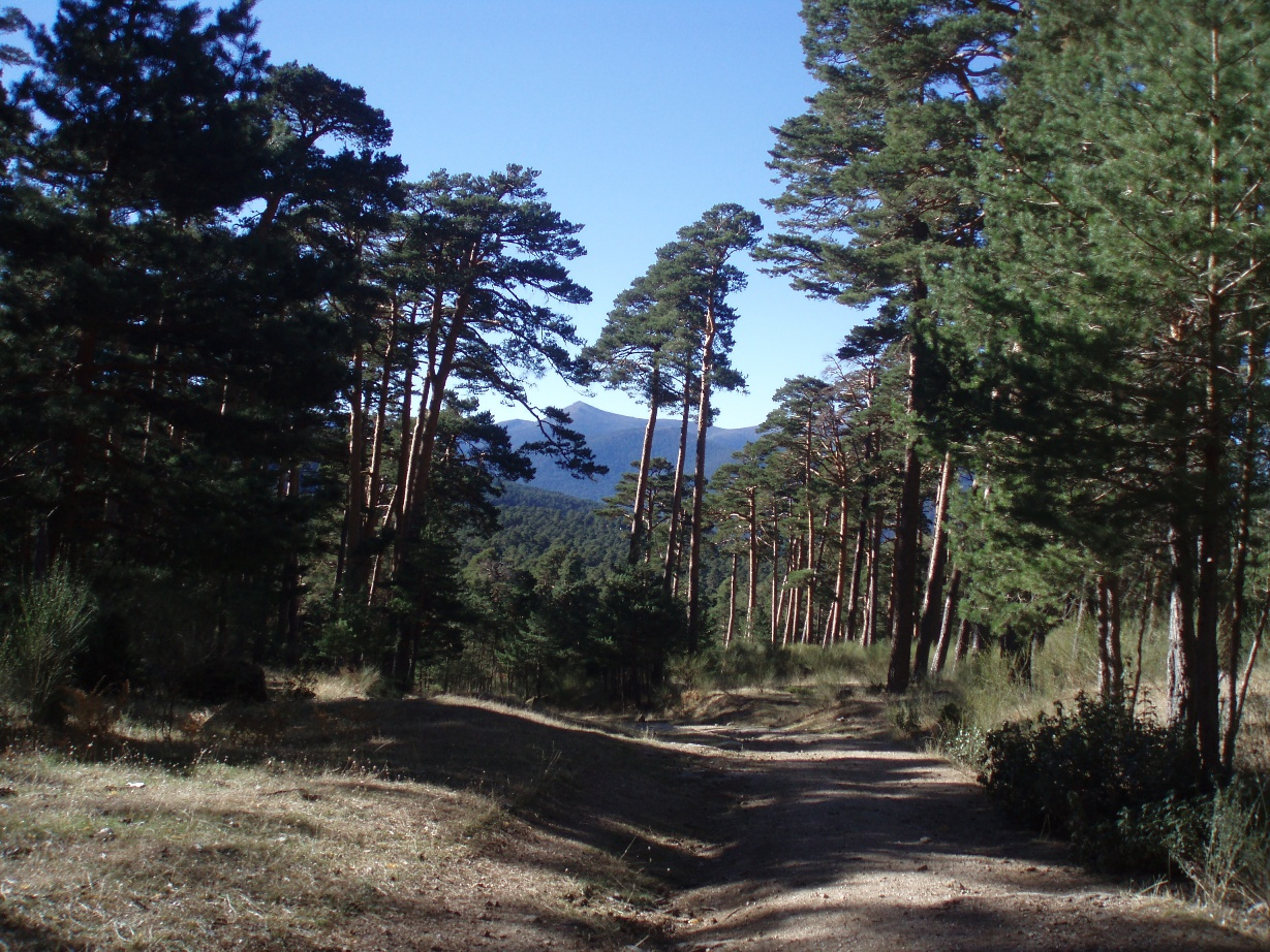 Valle de Valsaín (España).